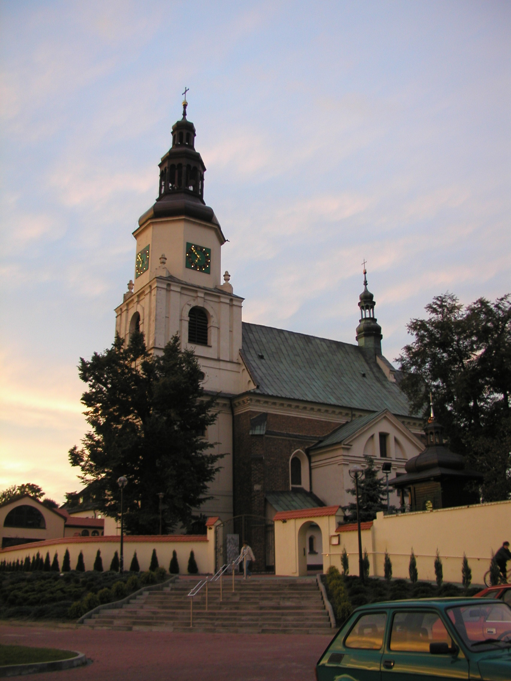 Krzepice (Polska). Kościół wieczorem. Data: IX 2005 r. Autor: Barbara Wrzesińska